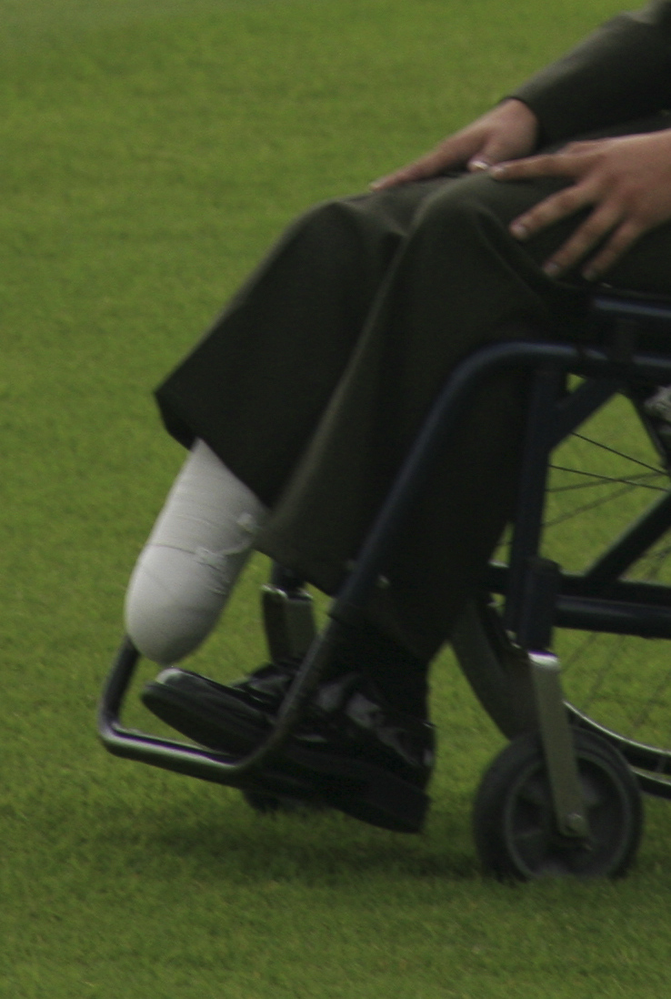 Día Internacional para la Sensibilización sobre las Minas Antipersonal.